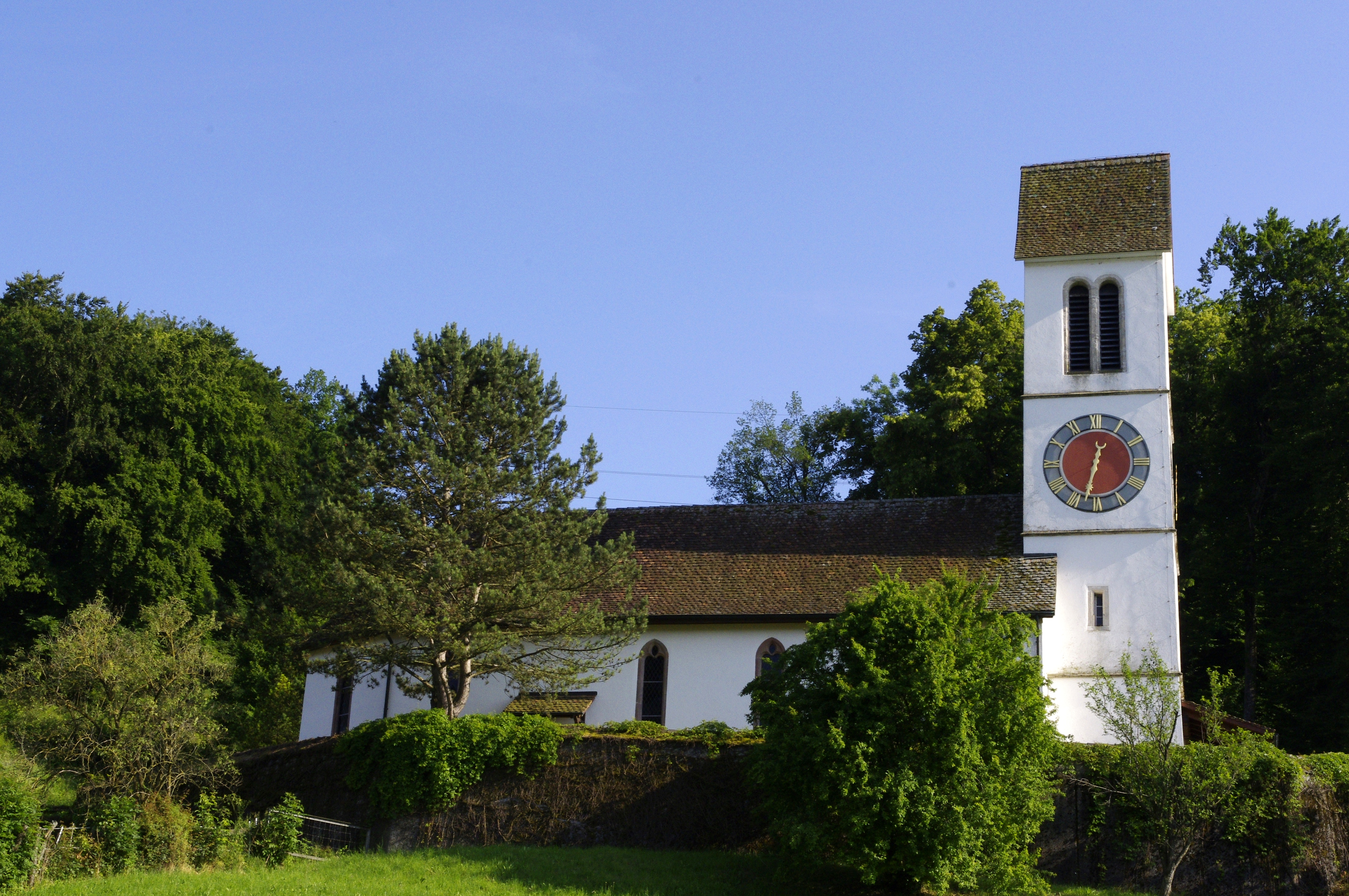 Ormalingen, Schweiz